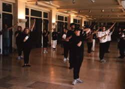 Classe d'escrime artistique de M. Bob Heddle-Roboth, Théâtre de Chaillot /Paris1998